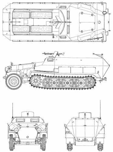 Rzuty niemieckiego transportera opancerzonego Sd.Kfz.251